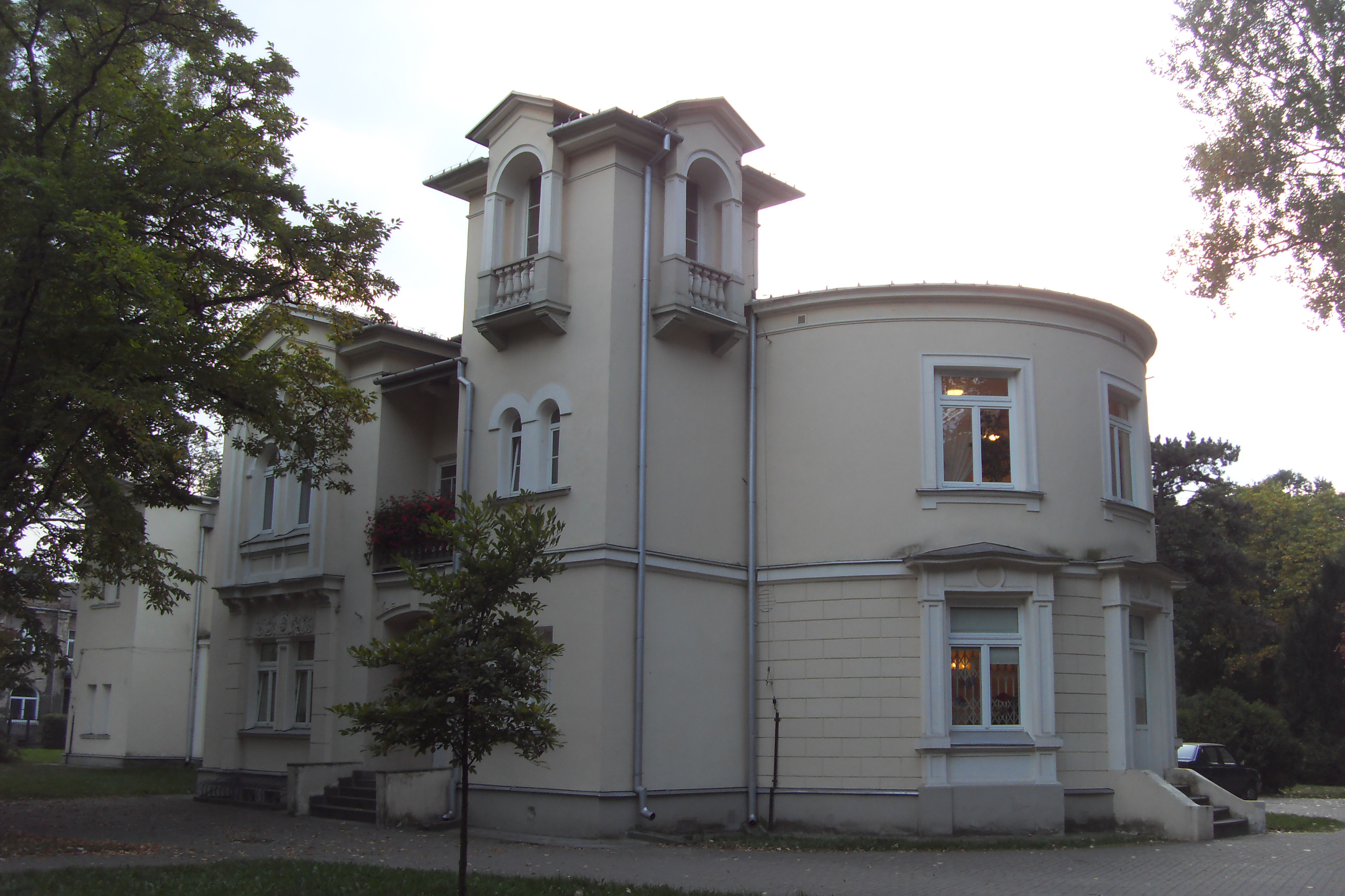 ul.Chrościckiego w Warszawie Włochy; pałac Mostowskich (Koelichenów), datowanie: 1846-1855 (zabytek nr rejestr. 710)